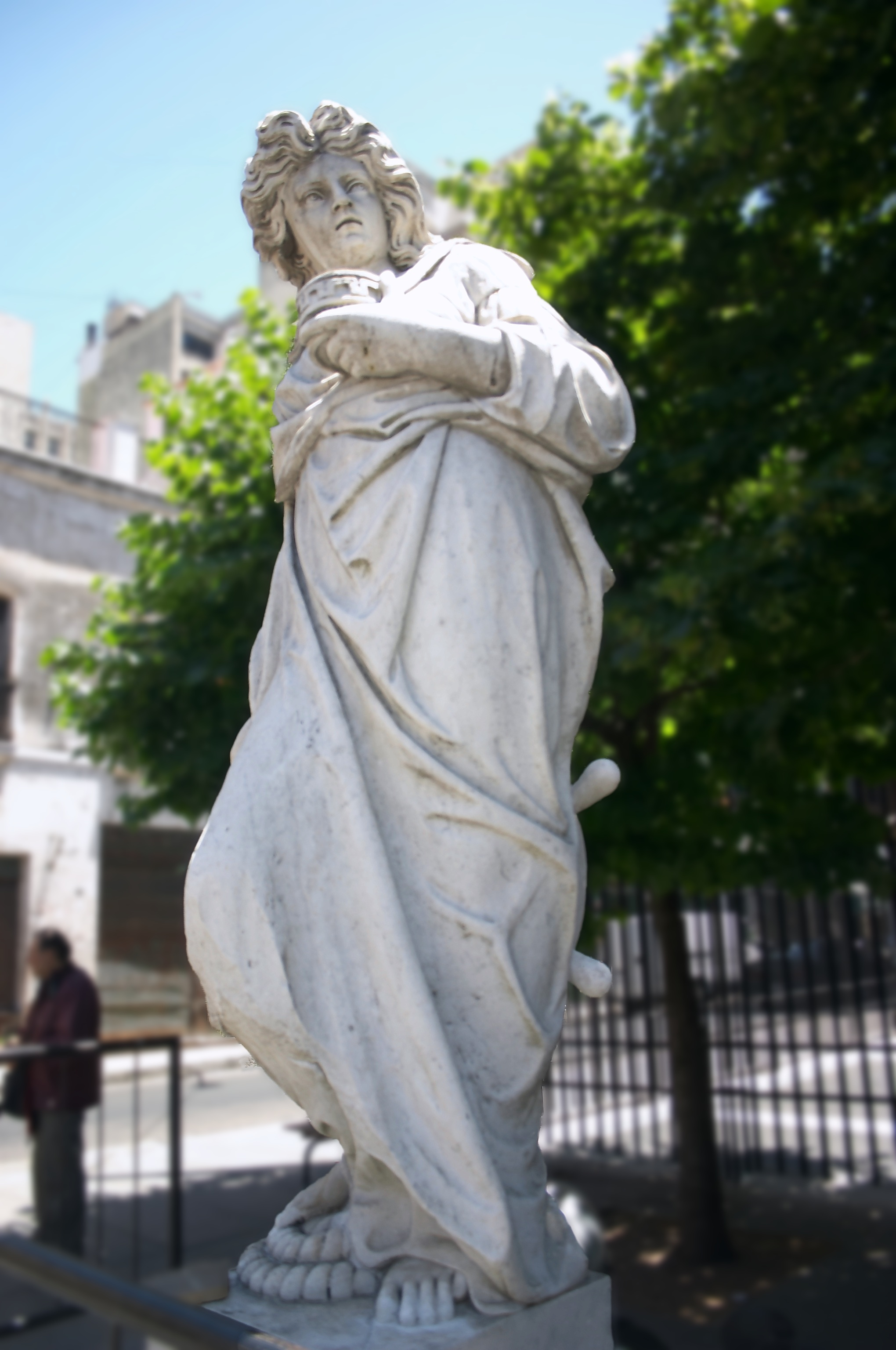 Estatua de la Navegación cuando estaba aun en la Plazoleta San Francisco, Buenos Aires, Argentina. Esquina de Defensa y Alsina, Barrio de Monserrat.